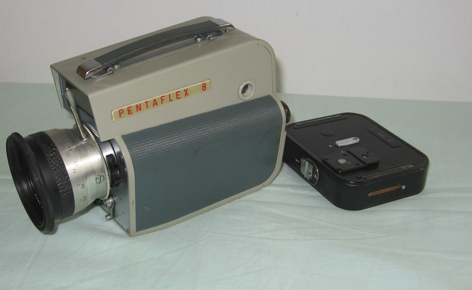 8-mm kamera filmowa Pentaflex-8, rok produkcji 1966